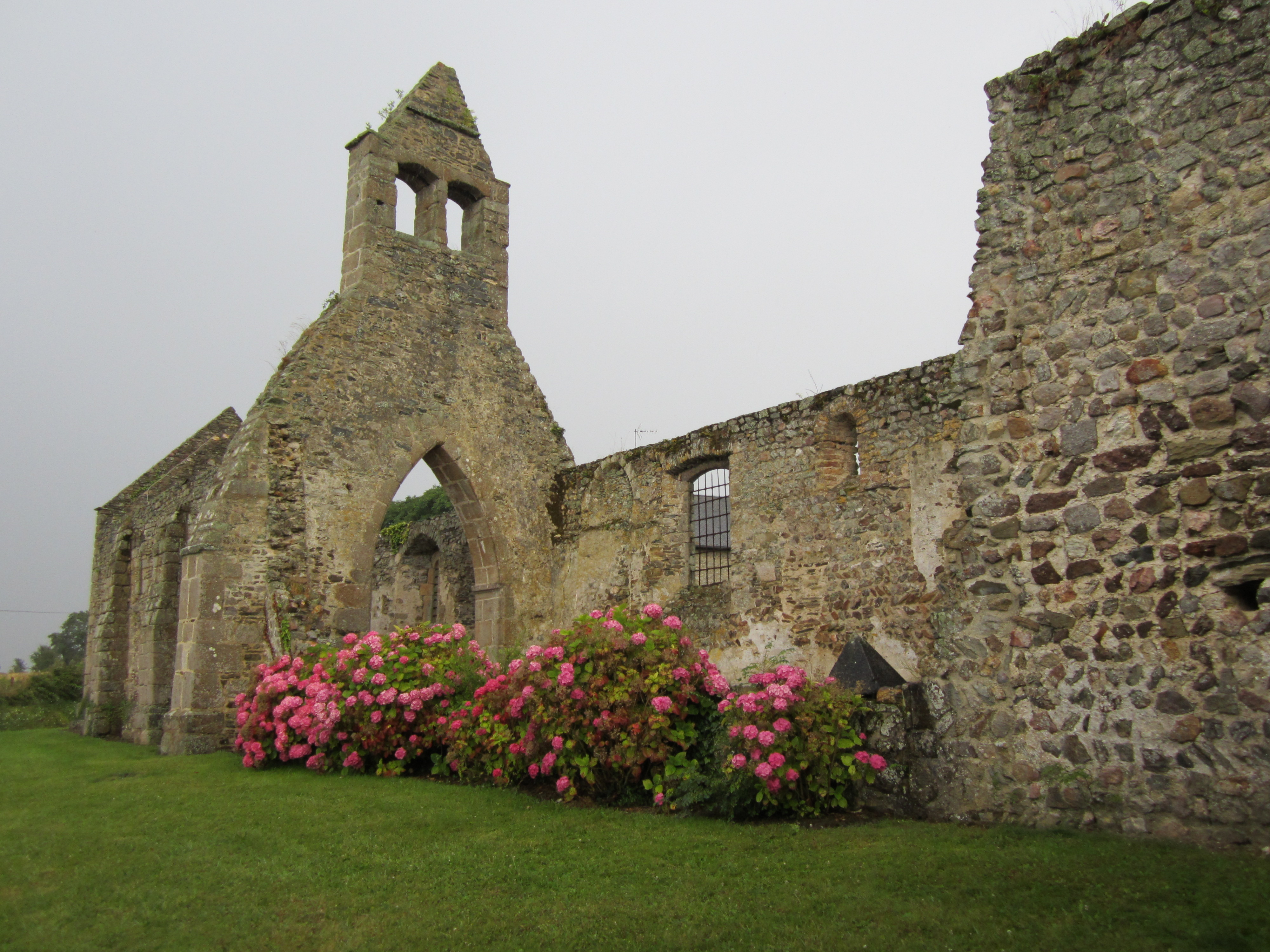 Ruine de l'église de Saint-Martin-le-Vieux (Manche) .